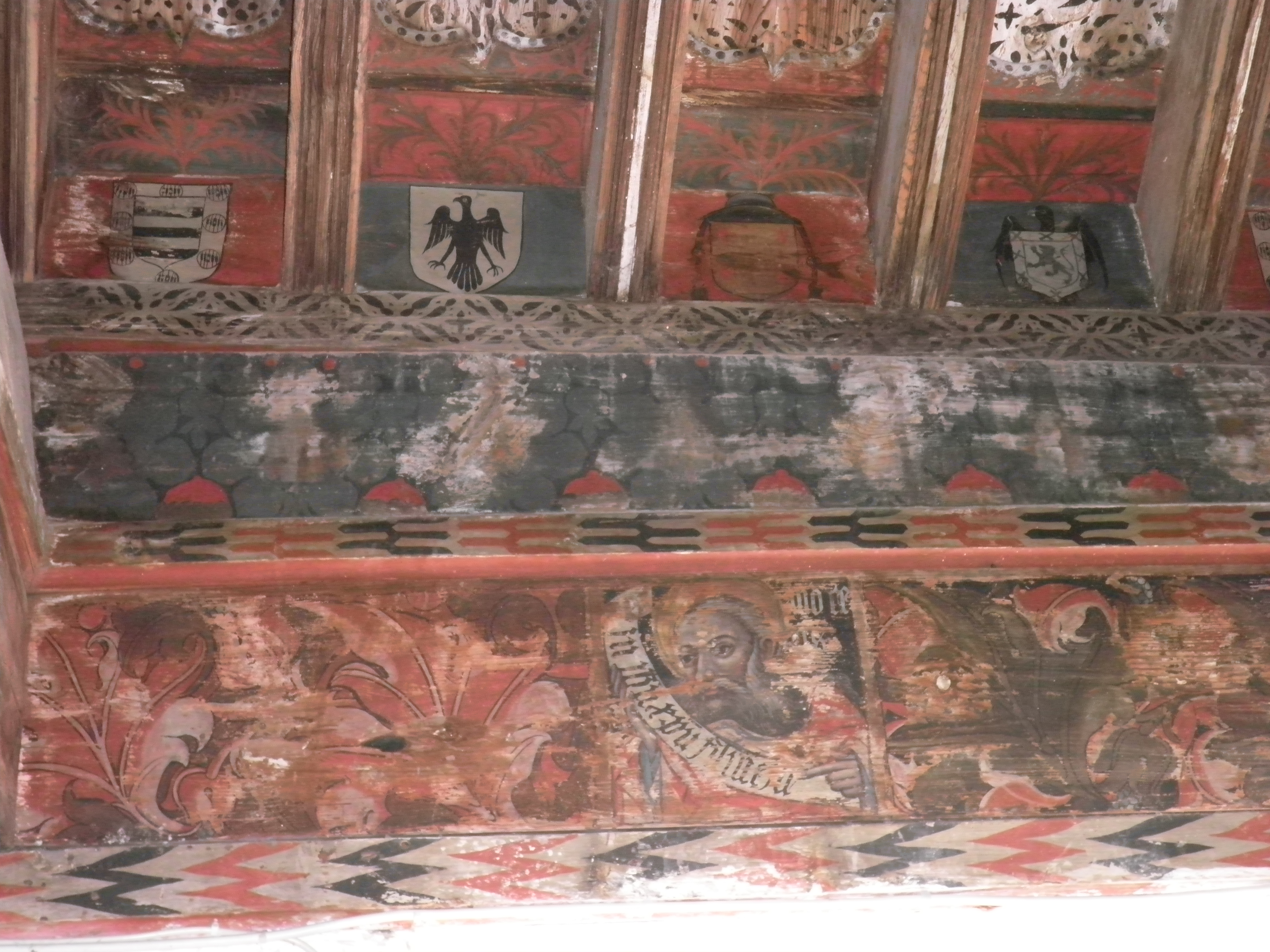 Detalle artesonado Iglesia parroquial de San Pedro del Arroyo